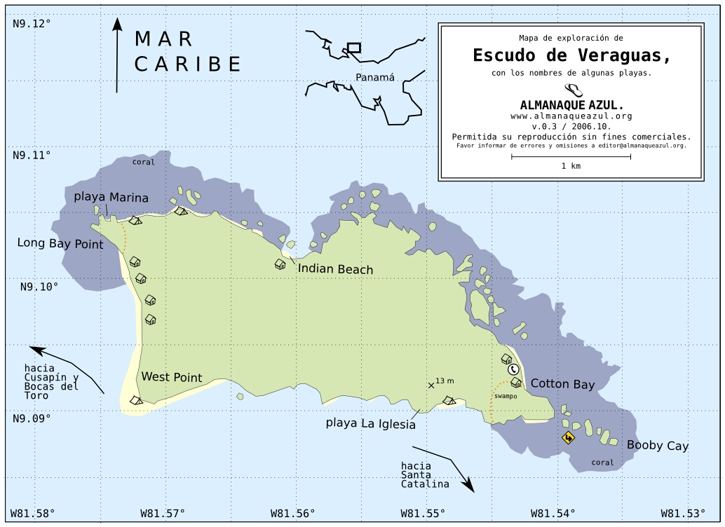 Mapa de la Isla Escudo de Veraguas en Bocas del Toro